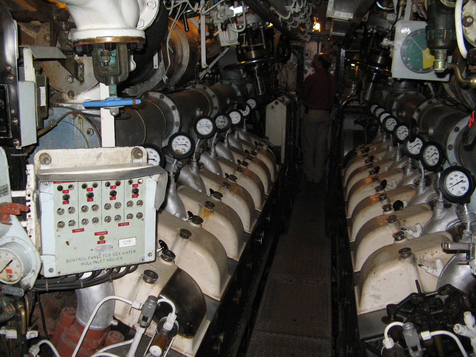 Im Inneren von HMS Otus: Maschinenraum